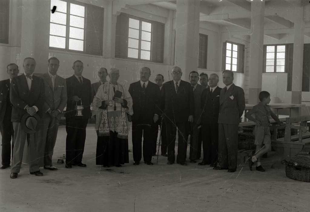 Título original: Inauguración de las instalaciones del mercado de Gros (2/2) Localización: San Sebastián (Guipúzcoa)